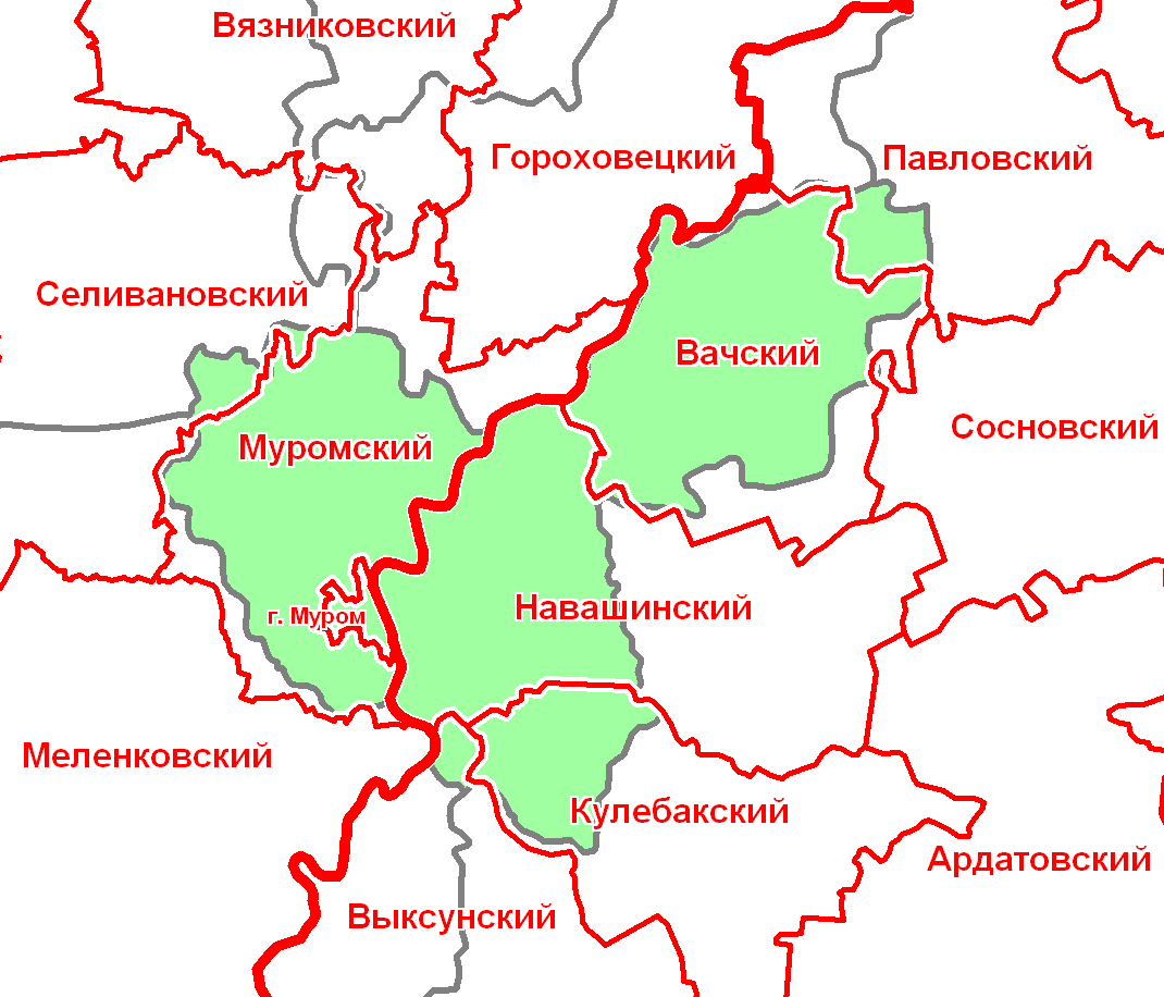 Муромский уезд в современной сетке районов.